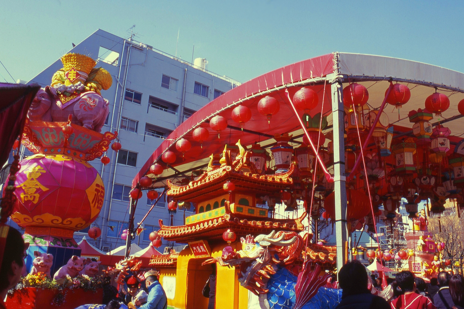 長崎市で行われる「長崎ランタンフェスティバル」の中央公園会場の様子。2010年2月撮影。OLYMPUS OM2000＋OM ZUIKO 28/3.5 ED